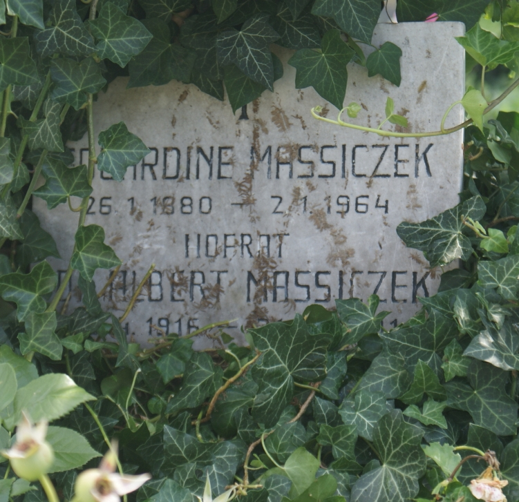 Albert Massiszek-Pötzleinsdorfer Friedhof (G-50)